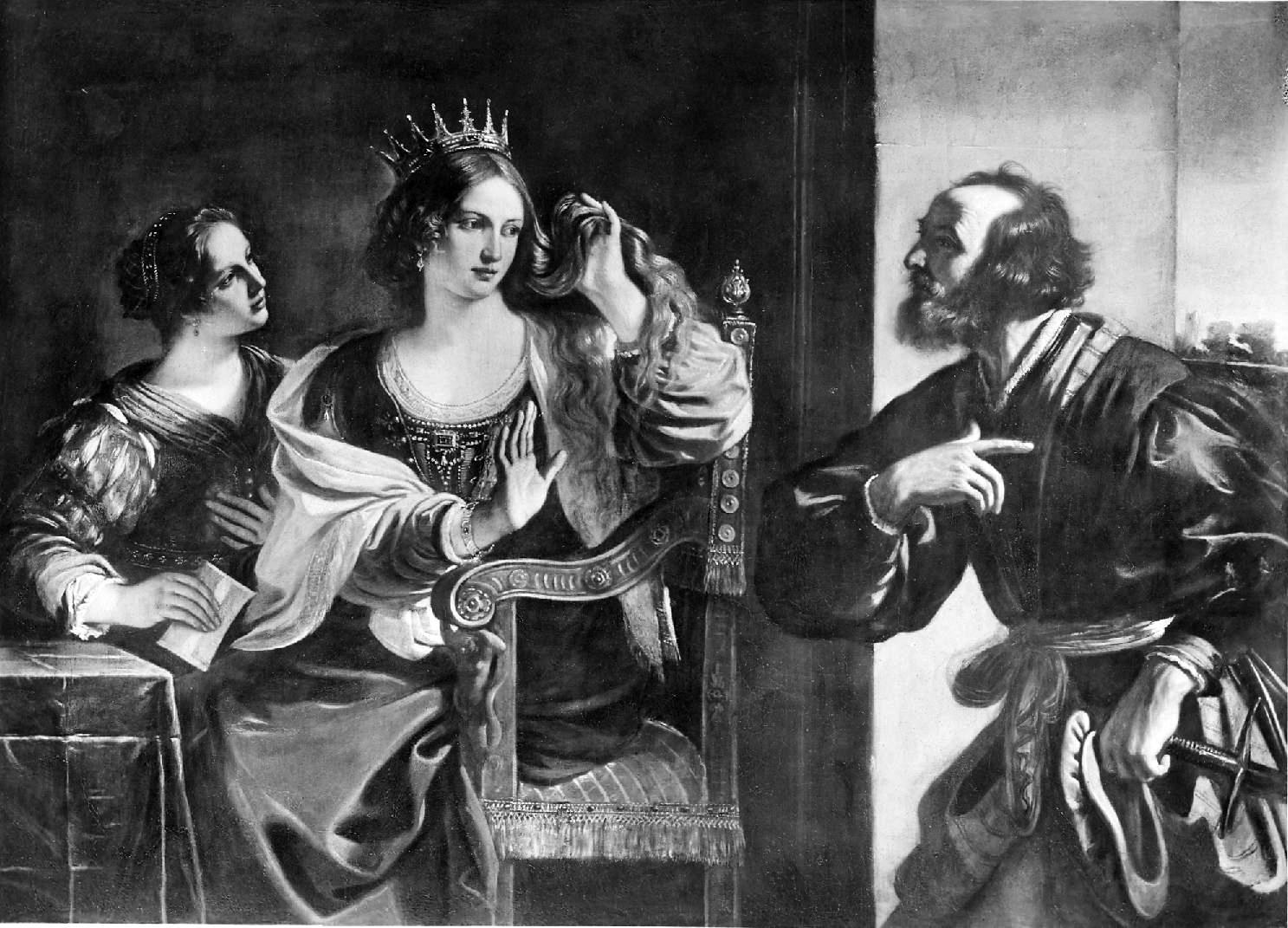 Semiramide